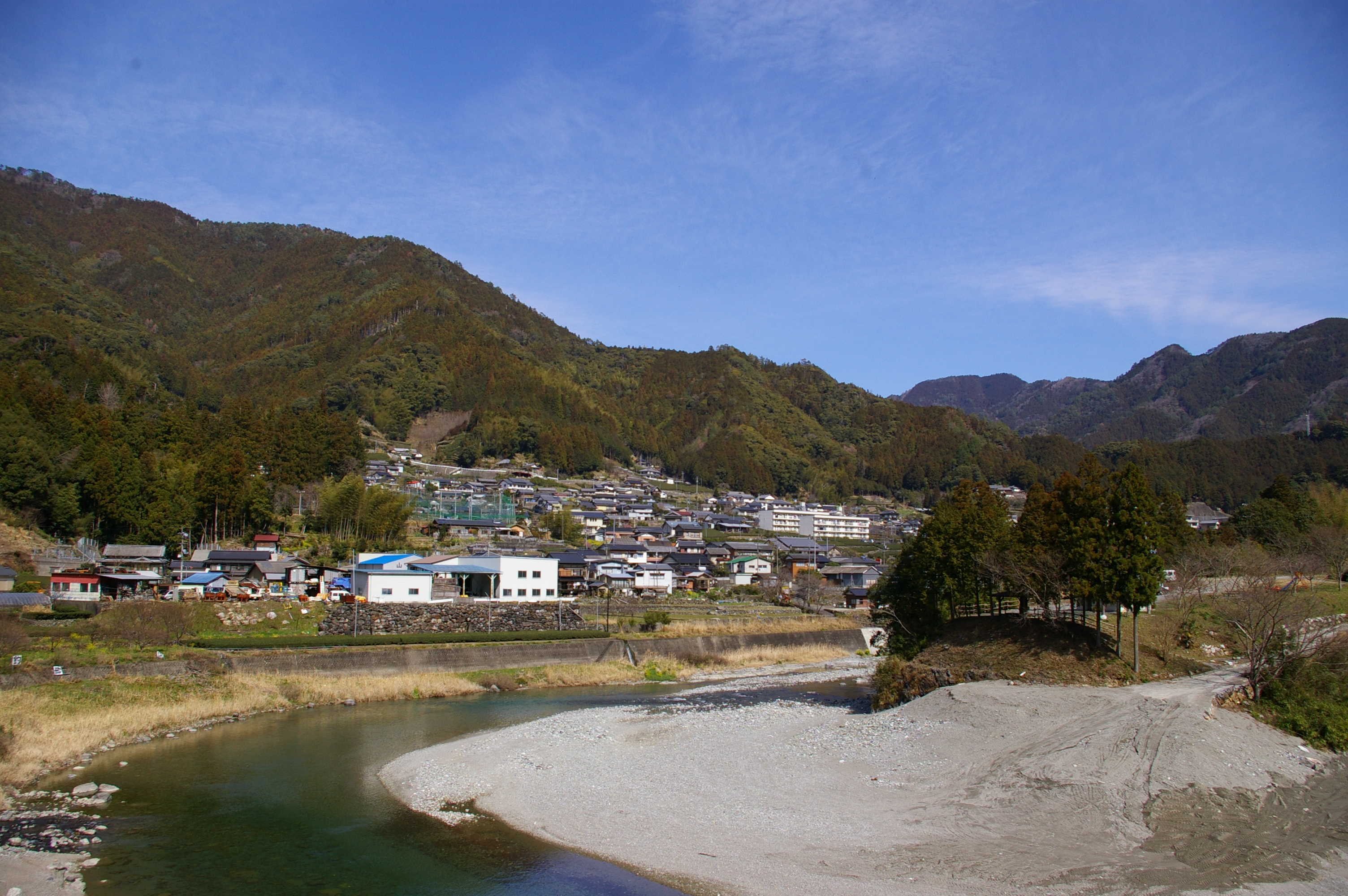 Takenotani_Ikegawa_Kochi prefecture, Japan